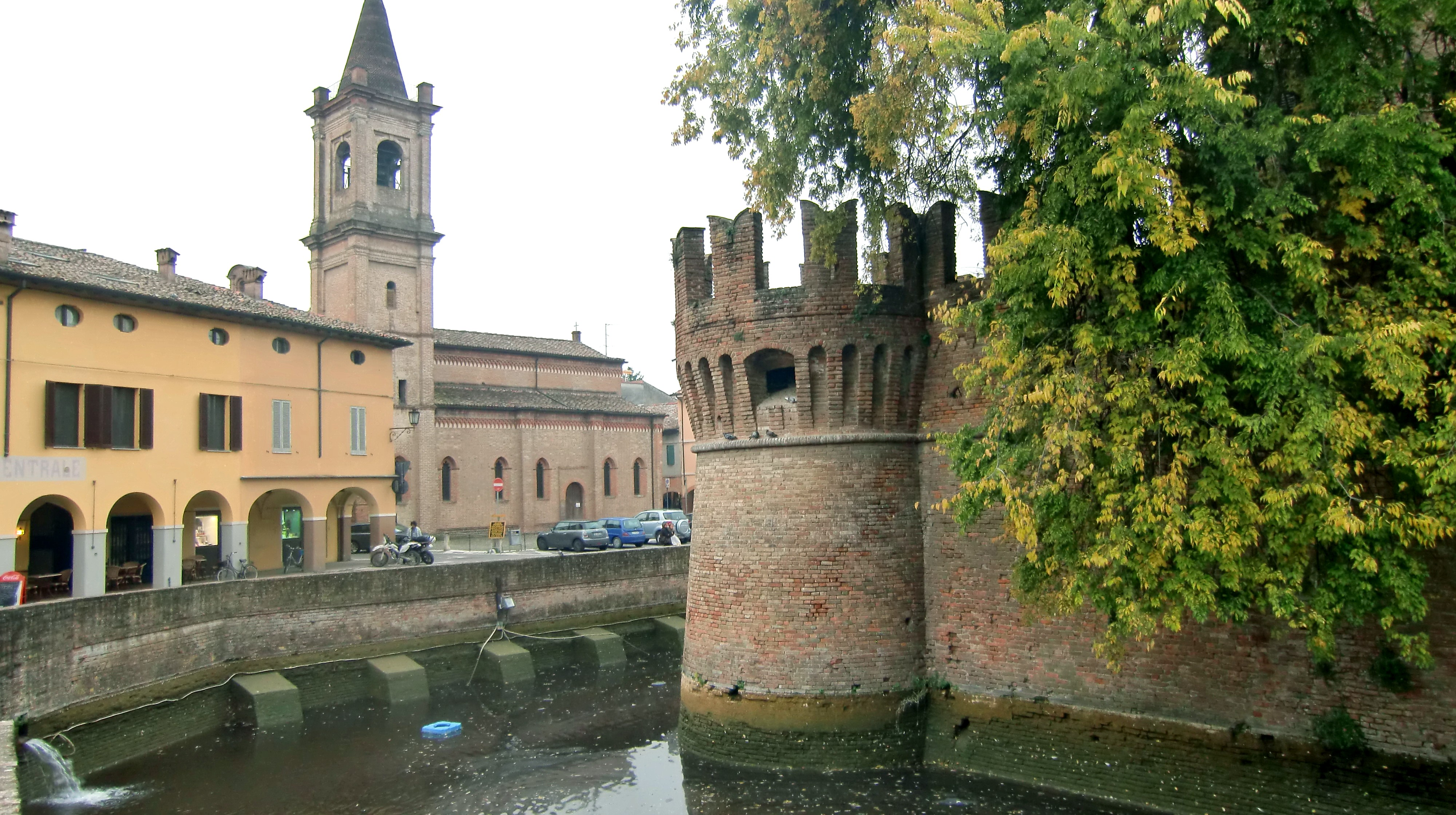 Fontanellato e torre d' angolo della Rocca Sanvitale